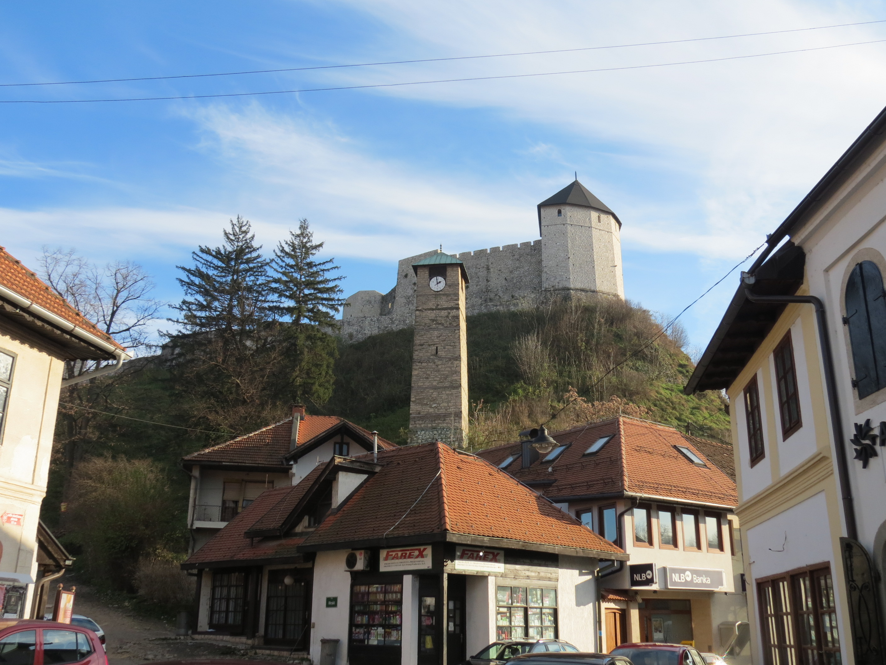 Tešanj - Tour de l'horloge